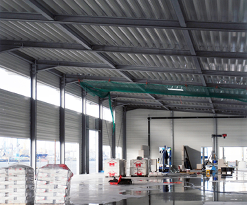 Baustellenfoto Cruise Center Baakenhöft